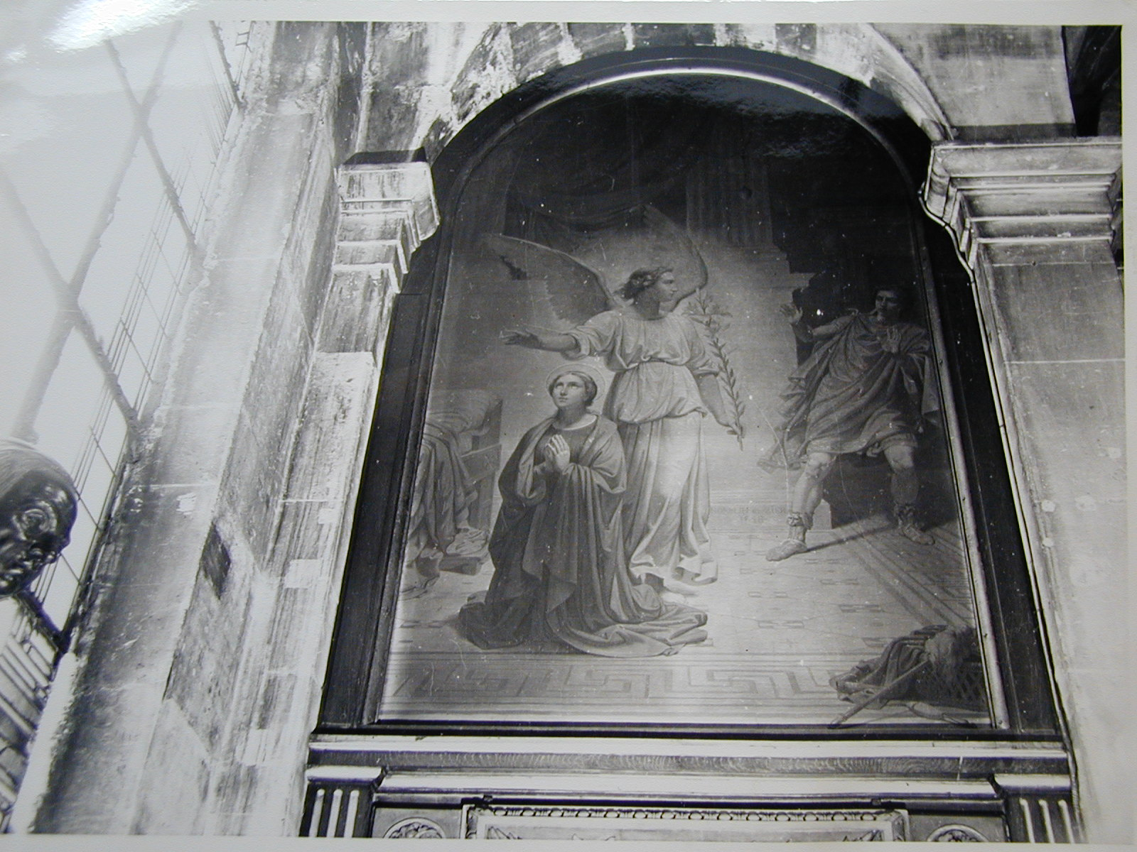 Foto des Altar der hl Susanna in der Kirche St.Roch Paris